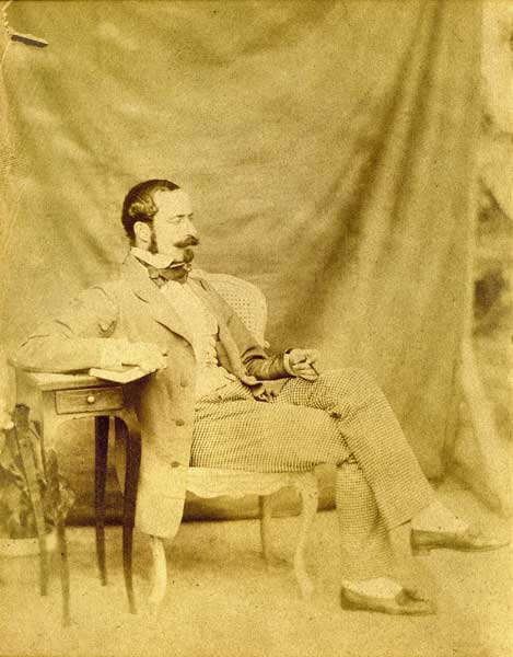 Portrait d'Emile Gaillard, banquier; 1870